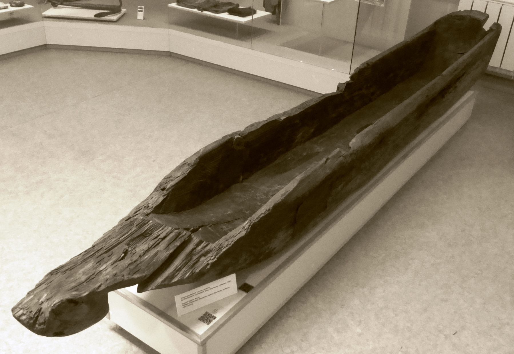 Лодка-долблёнка (челн). Экспонат Национального музея Республики Карелия (Петрозаводск).